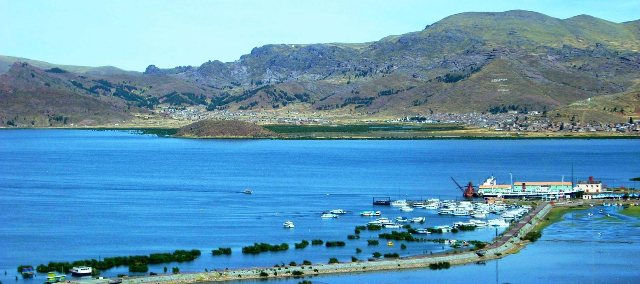 Platería Puno Peru